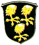 Coat of arms Upgant-Schott, Wappen der Gemeinde Upgant-Schott